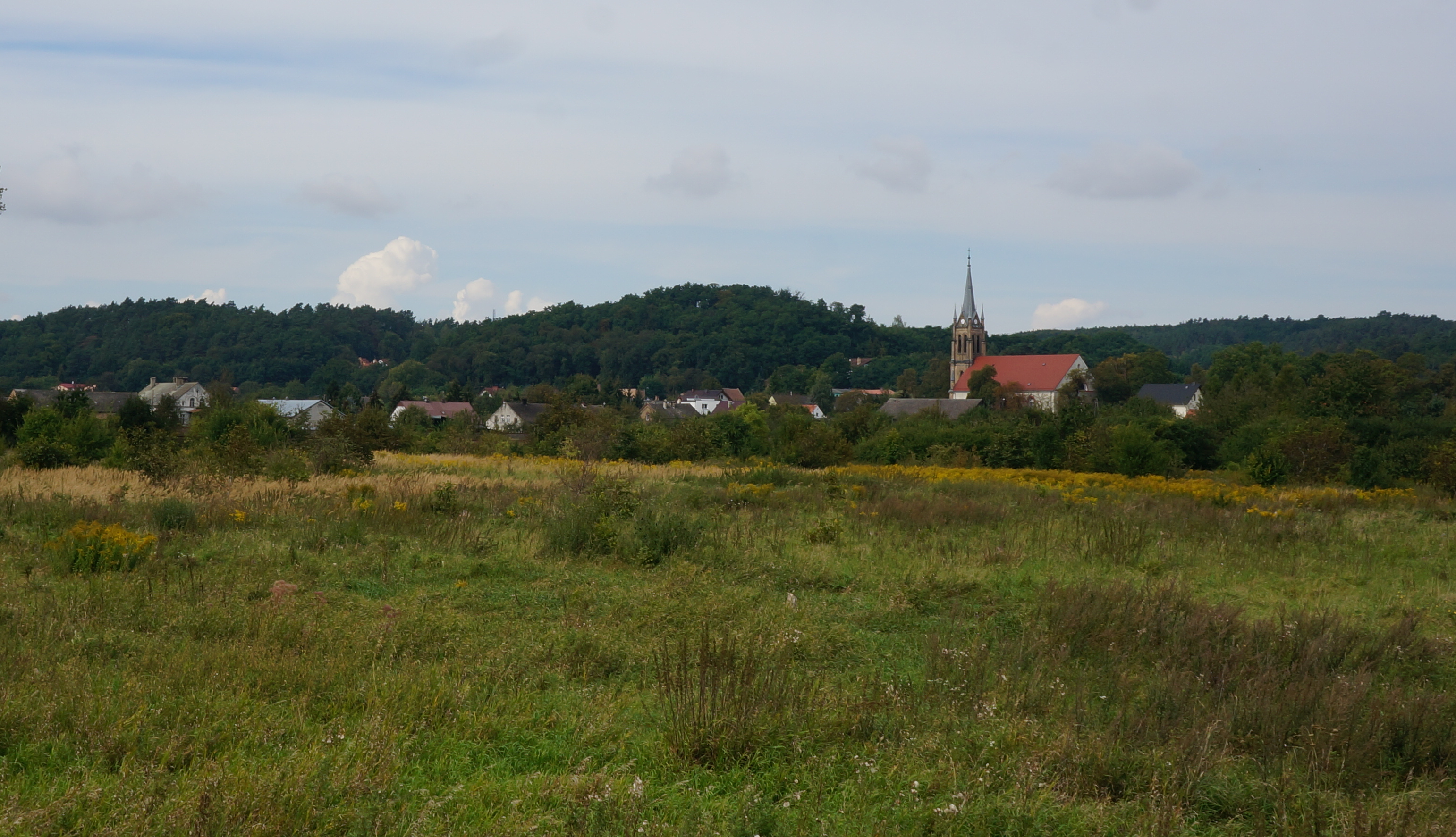 Wieprzyce, zachodnia dzielnica Gorzowa Wielkopolskiego. Widok z wału przeciwpowodziowego.